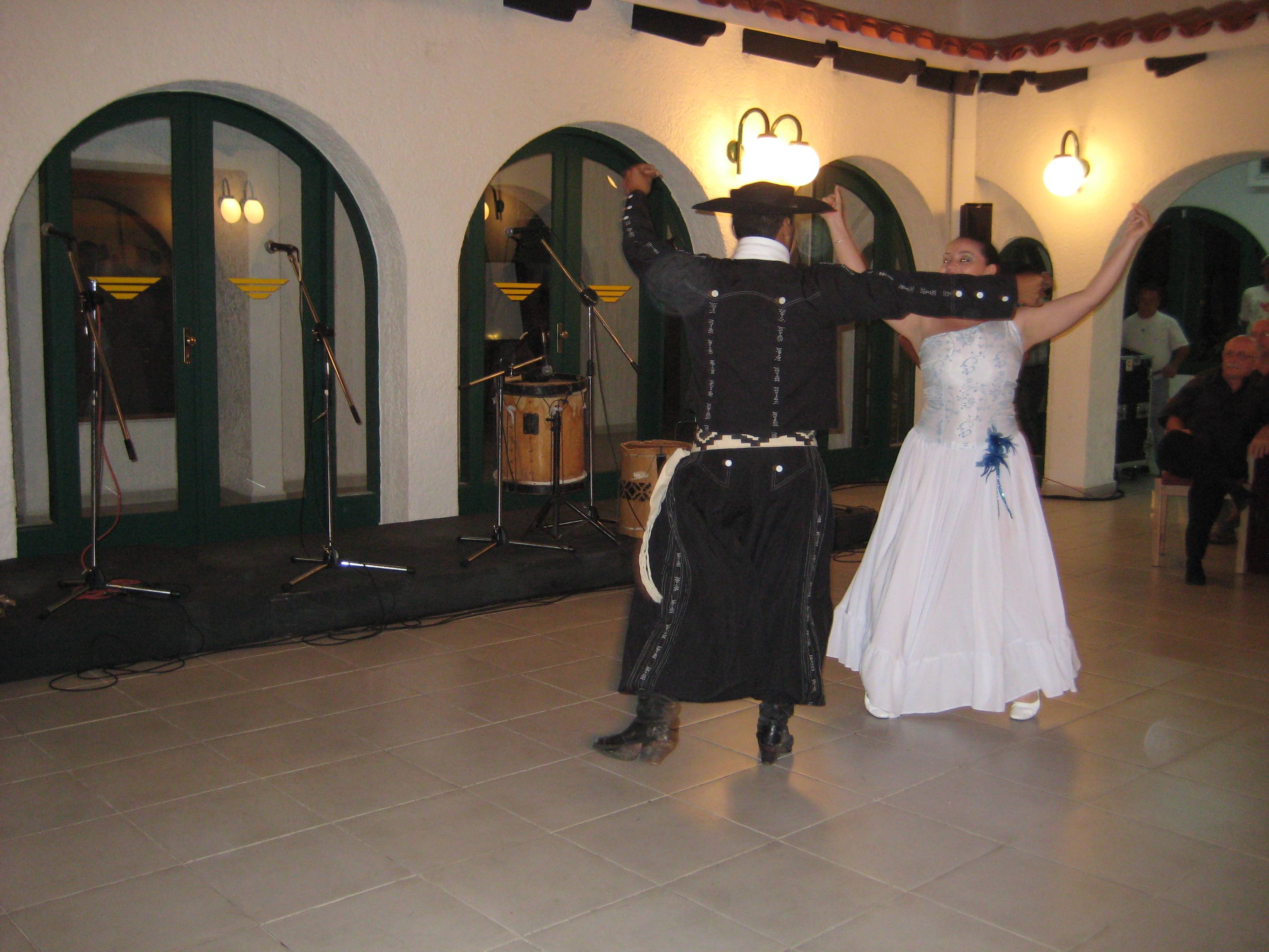 bailando chacarera en la ciudad de Santa Cruz, Bolivia.